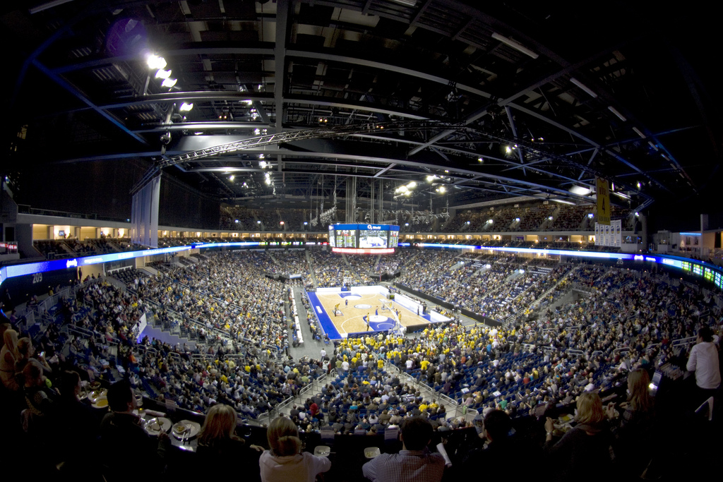 Alba Berlin vs BBC Bayreuth